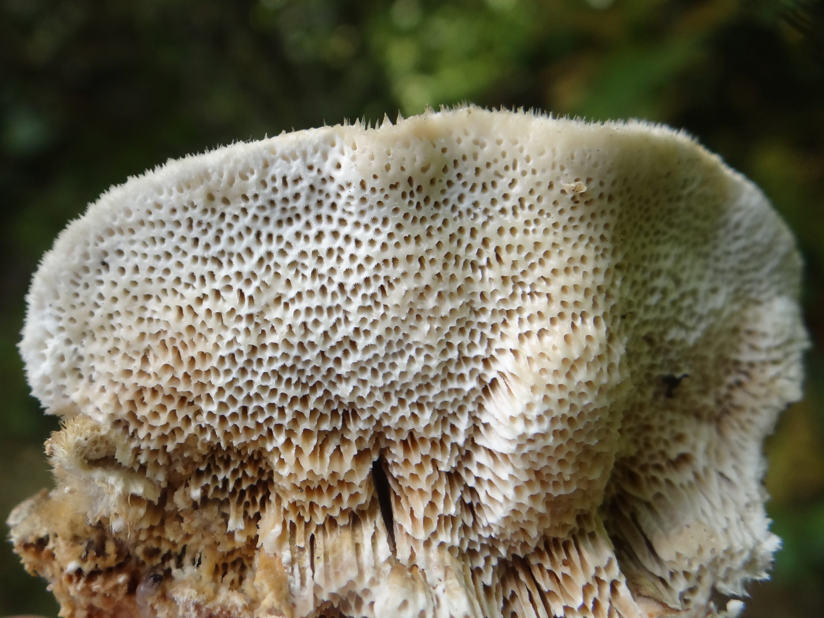 Trametes trogii. Location: Polnd, Rajbrot, woj, małopolskie